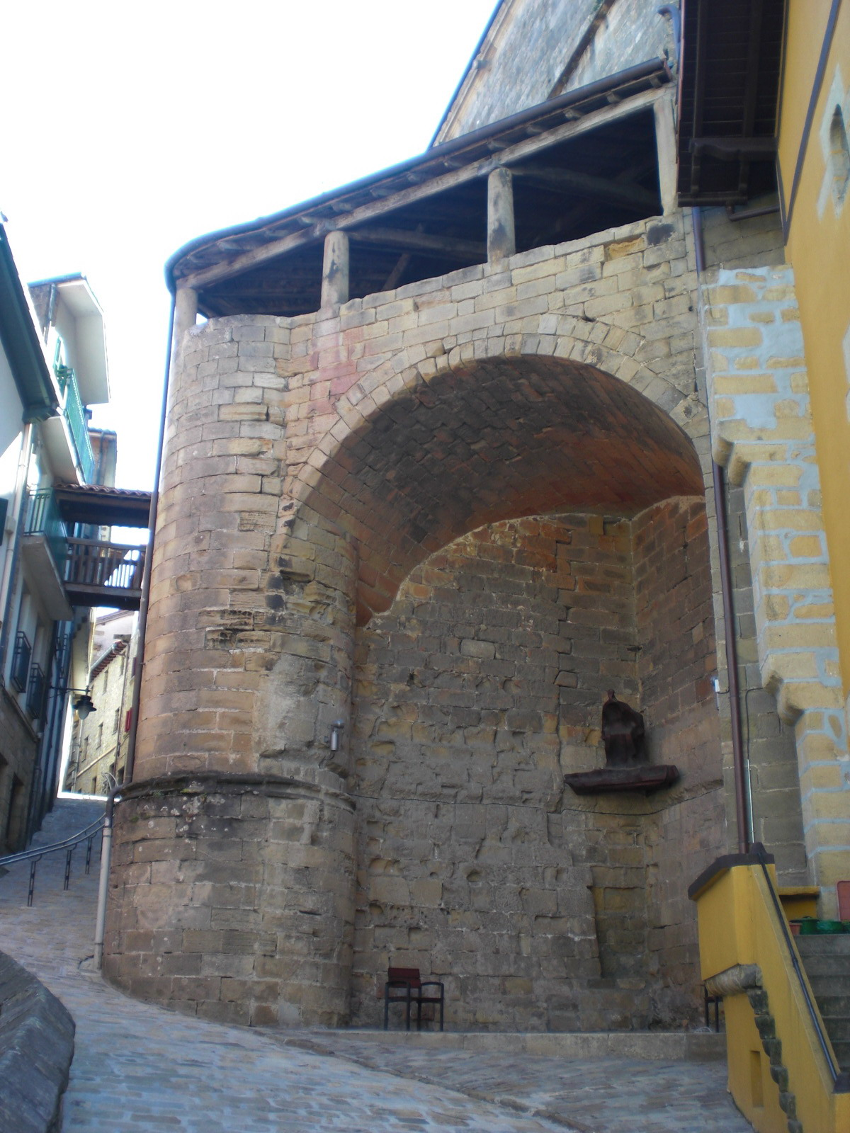 Orioko San Nikolas eliza.